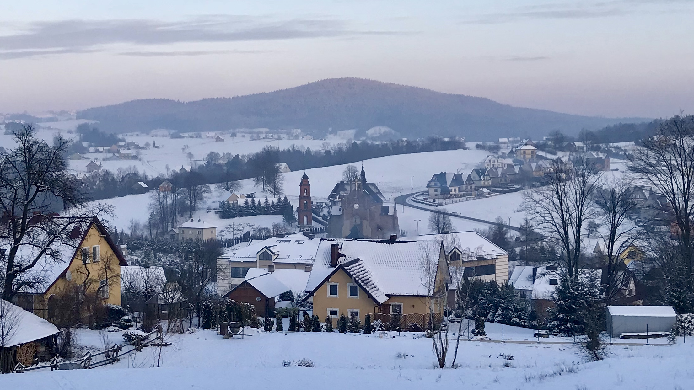 Panorama centrum Przyszowej zimą